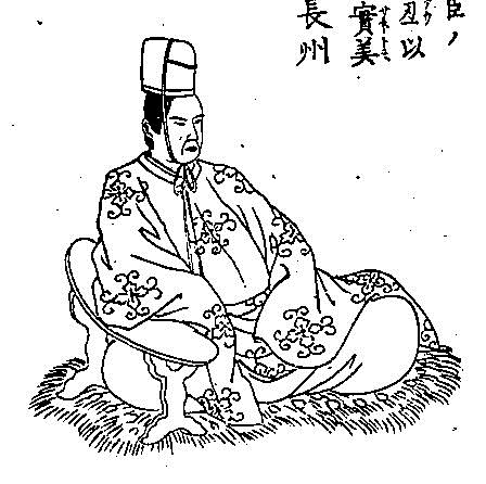 錦小路頼徳